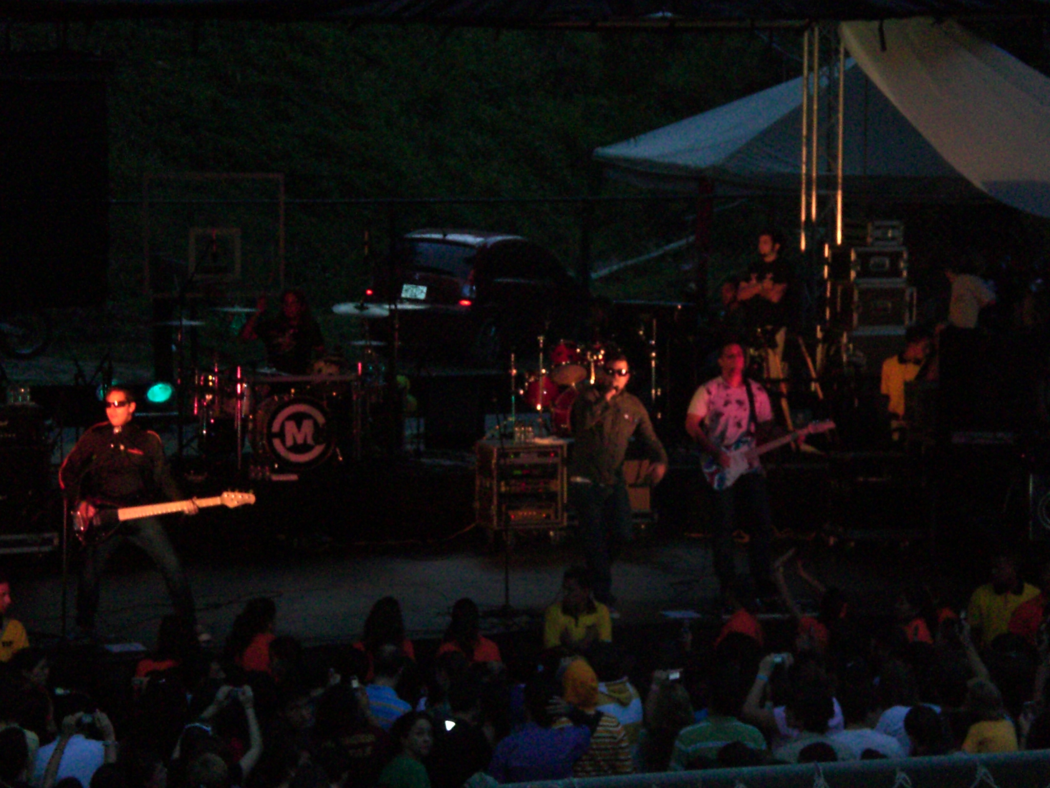 Venezuelan Rock band Malanga.